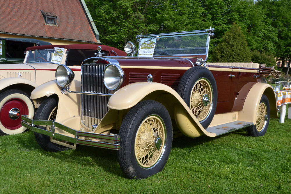 Walter 6-B faeton 2